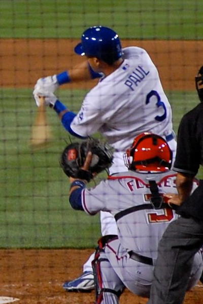 Xavier Paul